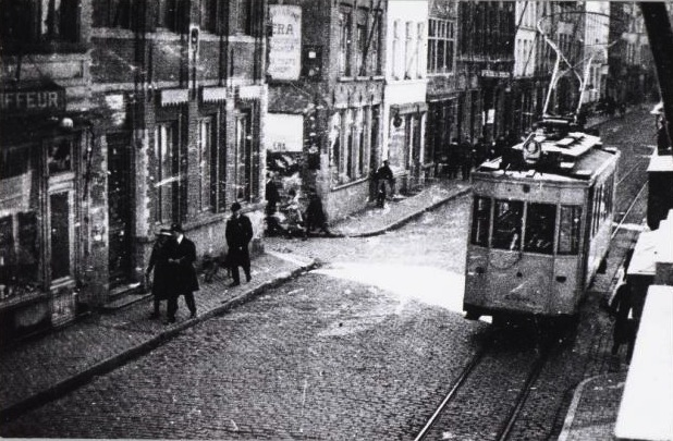 Tram 2 in de Noordzandstraat in Brugge anno 1920. De eerste straat links is de Kopstraat.